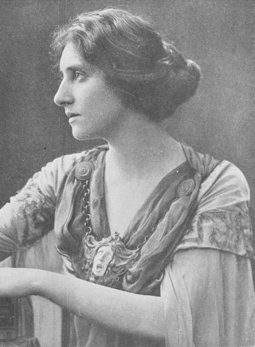 Hedwiga Reicher, germana kaj usona aktorino kaj esperantistino